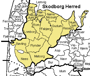 Skodborg Herred, Ringkøbing Amt, Denmark Map by Svend-Erik Christiansen , edited by Nico-dk.